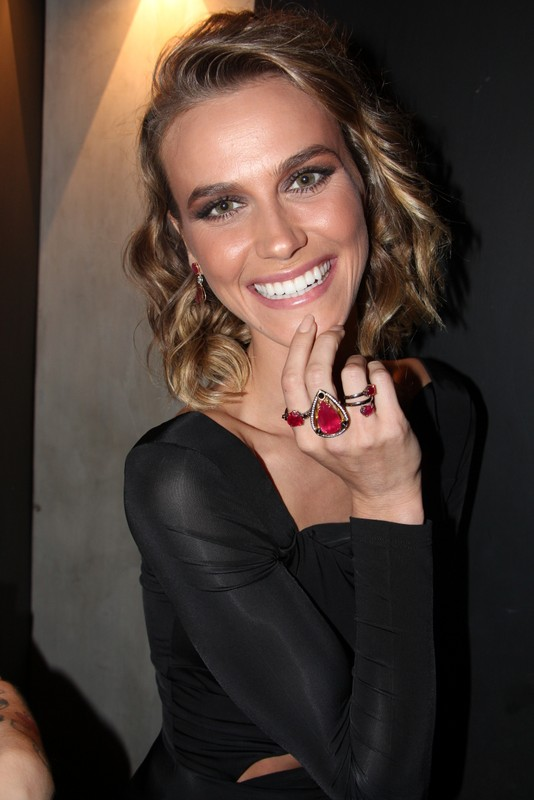 9 - Renata Kuerten-001